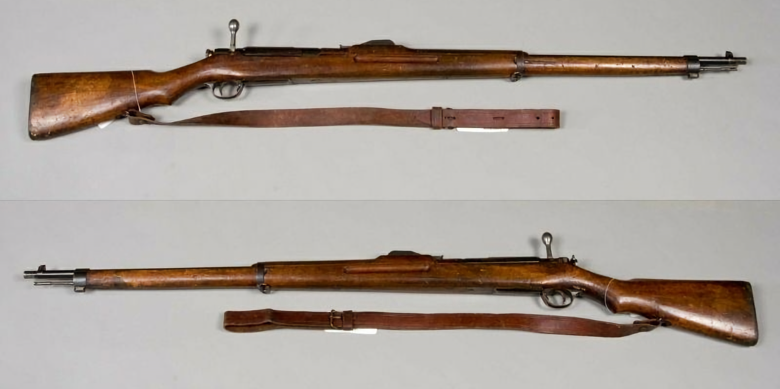 Japonska repetirka tip (model) 35, uvedena leta 1902.